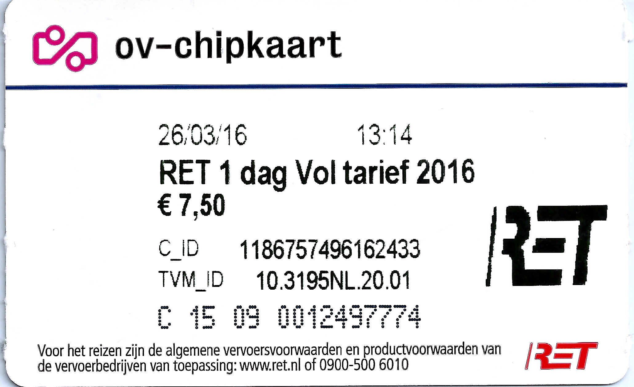 RET 1 dag Vol tarief 2016 - ov-chipkaart